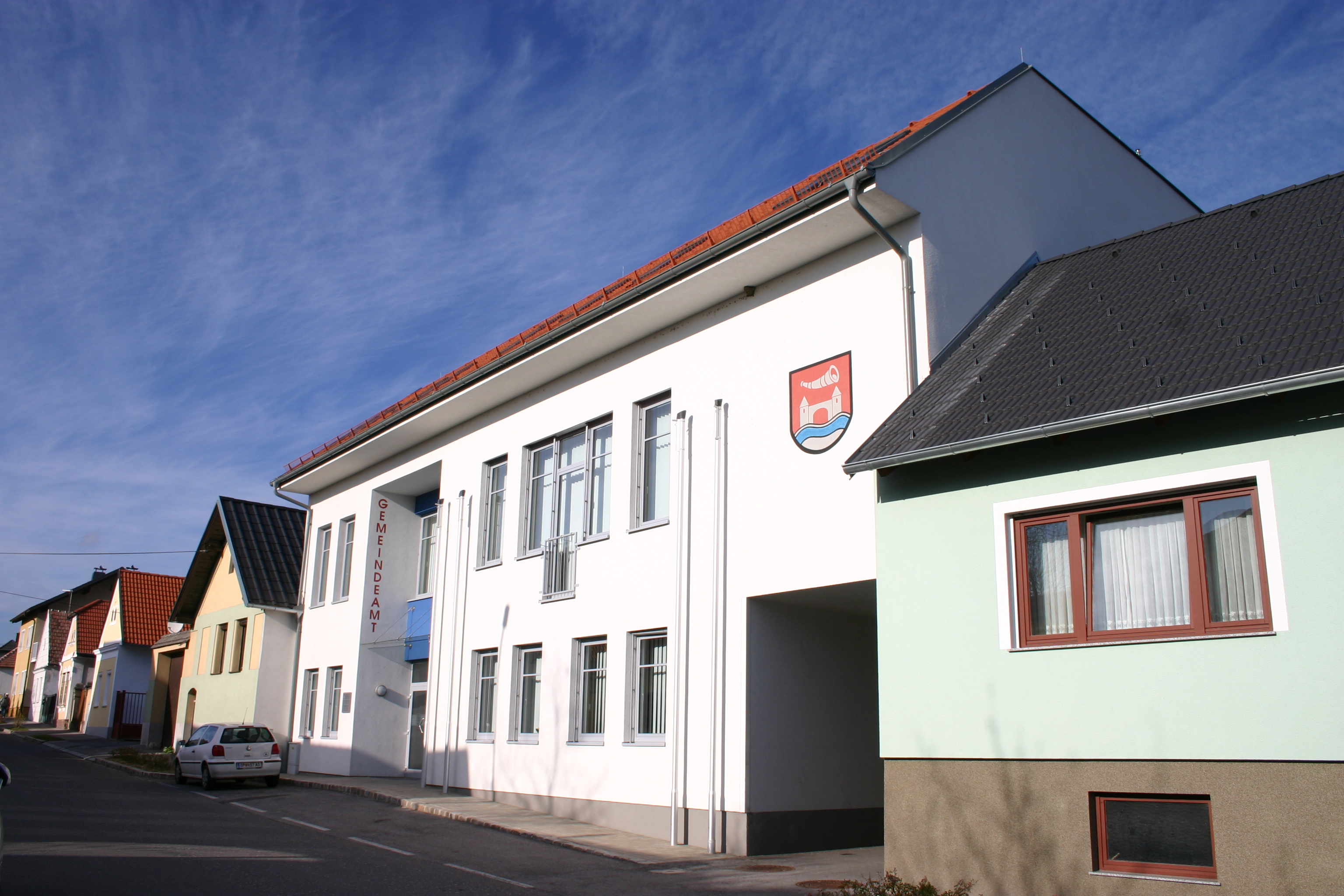 Lackenbach, Gemeindeamt